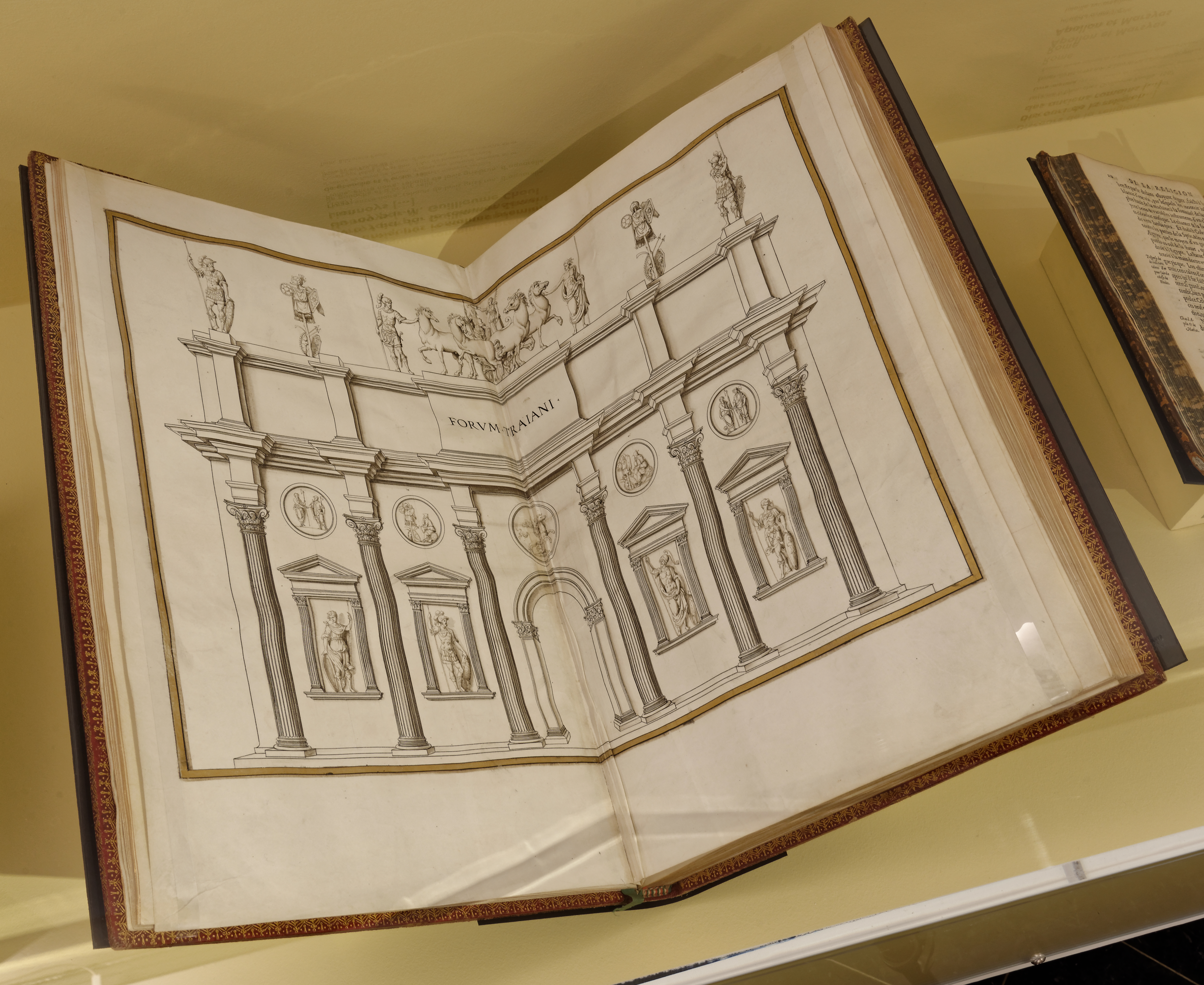 Exposition Lyon Renaissance. Arts et humanism, cat 80. Premier livre manuscrit des Antiquités romaines de Guillaume du Choul, folio 8 et 8bis : l'arc de triomphe servant d'entrée du forum de Trajan, d'après une monnaie d'or